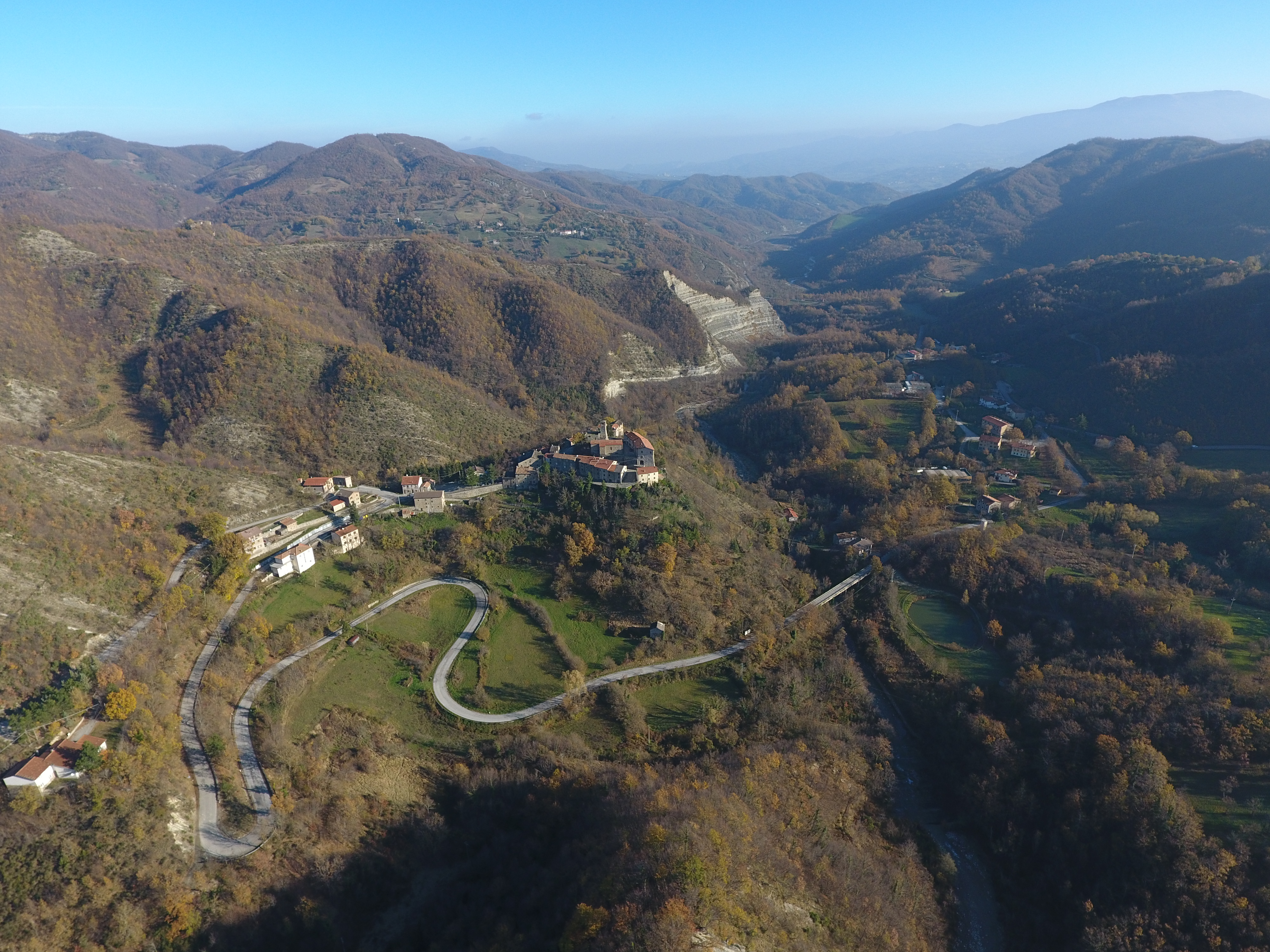 Casteldelci Centro Storico